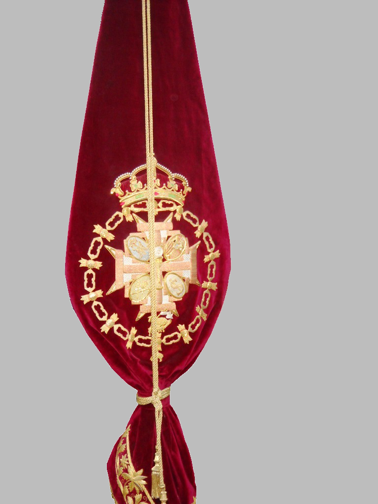 Escudo de la Hermandad de la Sagrada Cena. Semana Santa de Sevilla (España).